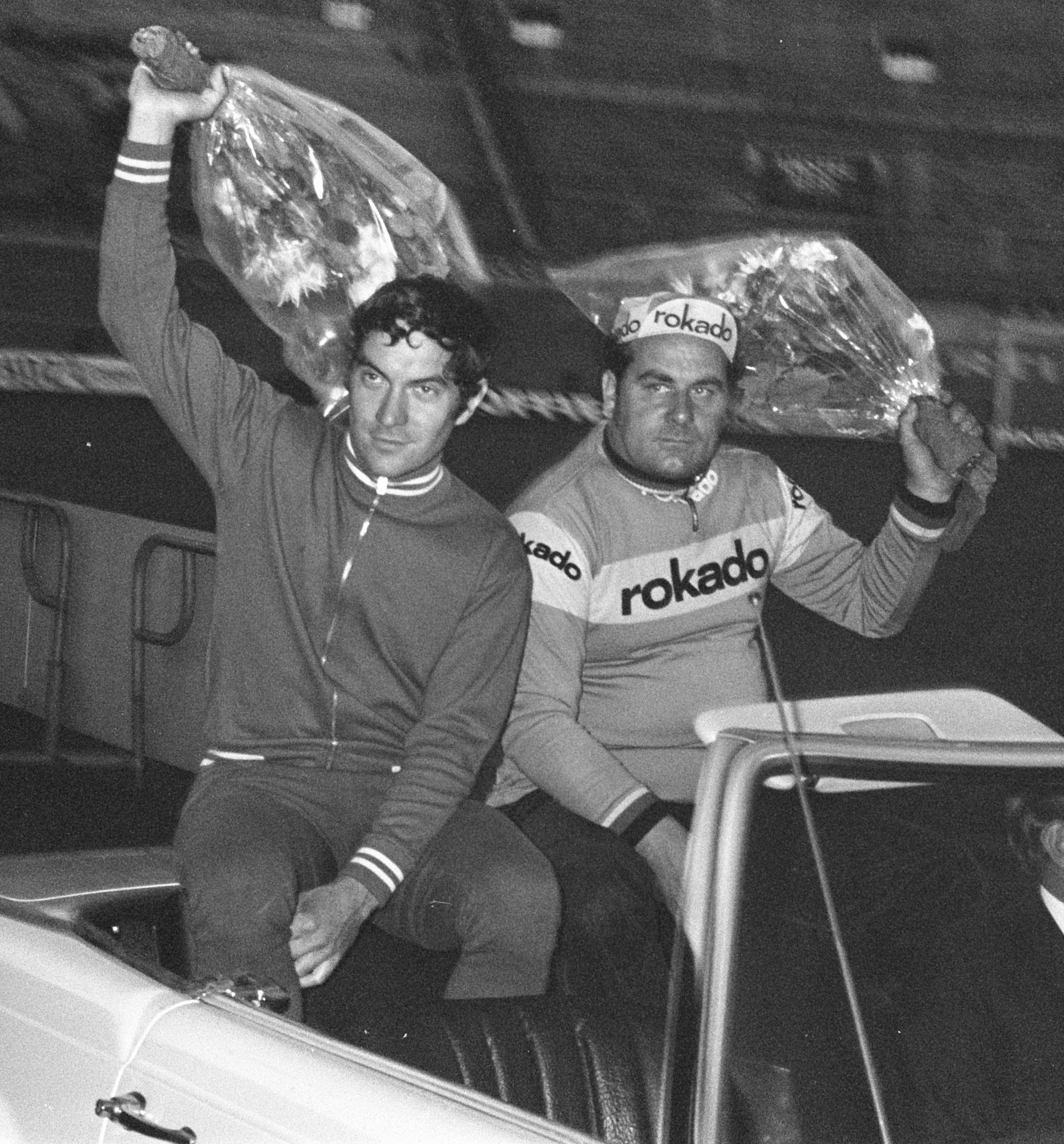 Collectie / Archief : Fotocollectie Anefo Reportage / Serie : [ onbekend ] Beschrijving : Huldiging wielrenners na wereldkampioenschappen in Olympisch Stadion Datum : 7 augustus 1972 Trefwoorden : huldigingen, stadions, wielrennen Fotograaf : Punt, […] / Anefo Auteursrechthebbende : Nationaal Archief Materiaalsoort : Negatief (zwart/wit) Nummer archiefinventaris : bekijk toegang 2.24.01.05 Bestanddeelnummer : 925-7919